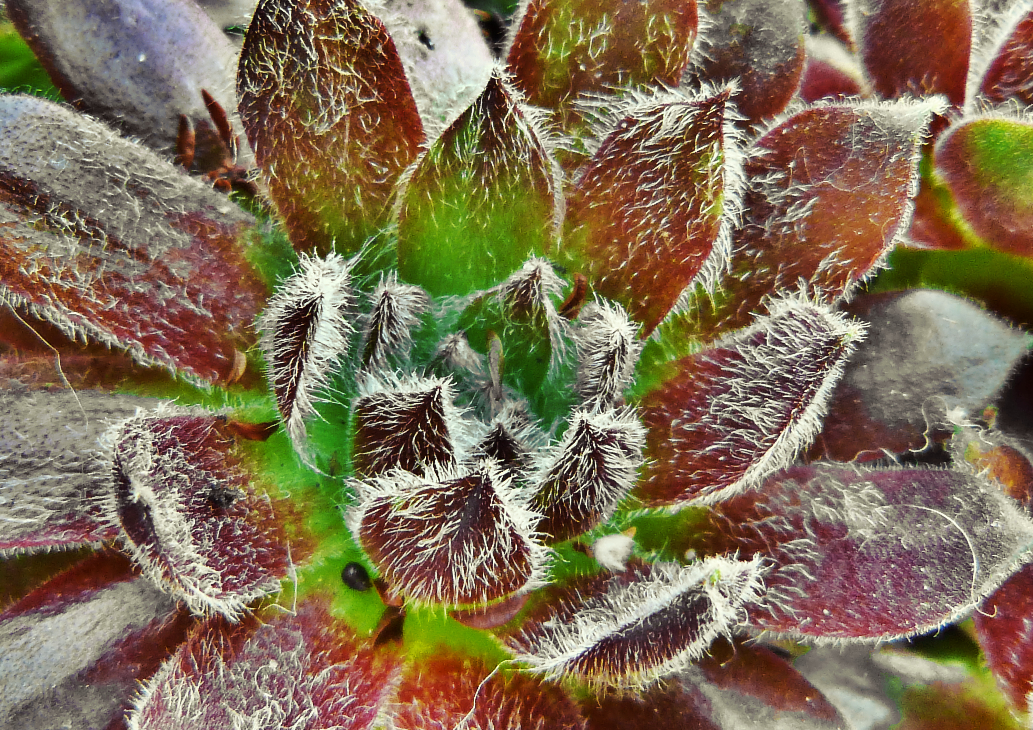 Kövirózsa